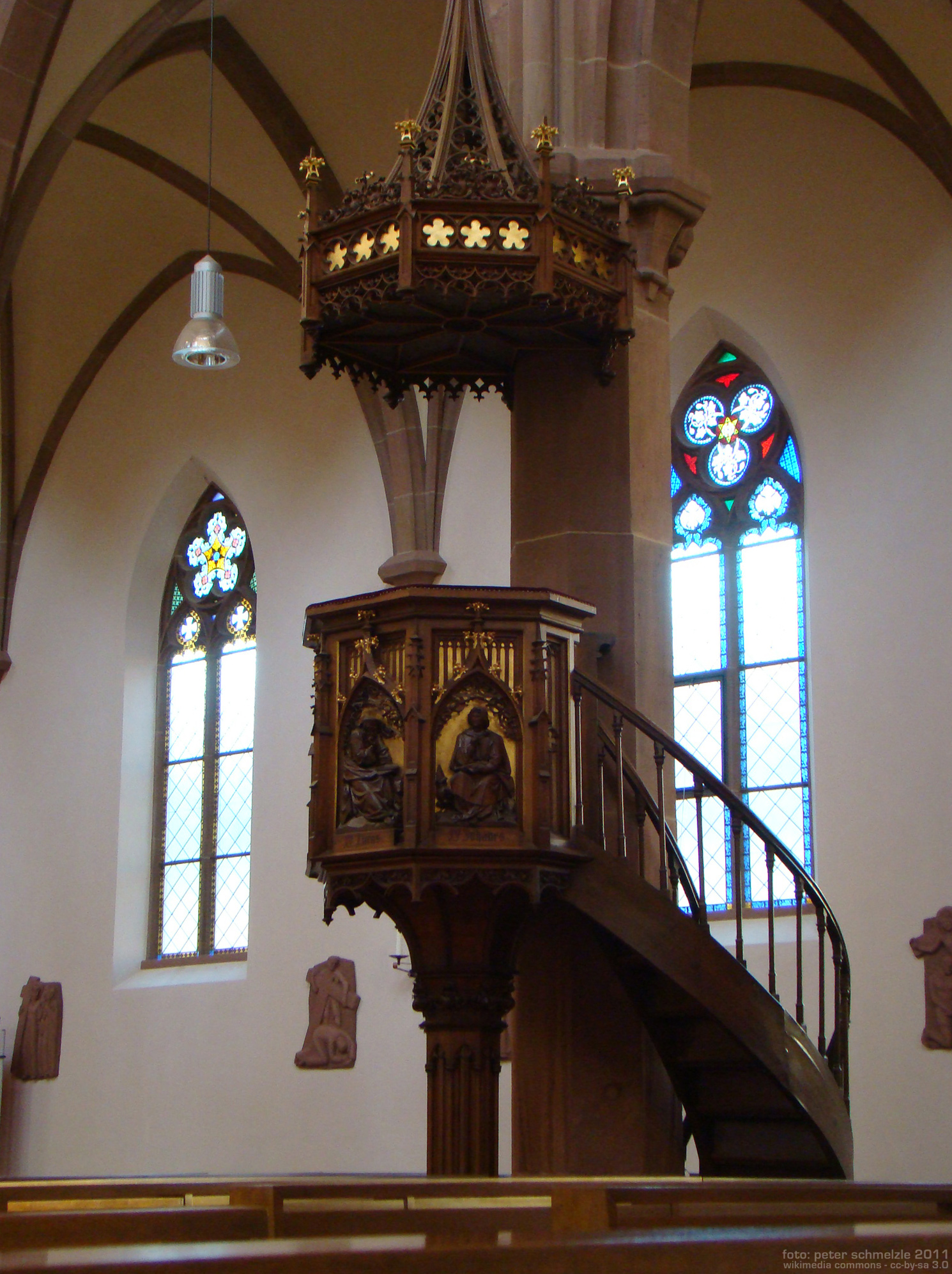 Kanzel der Pfarrkirche Unserer lieben Frau in Waibstadt